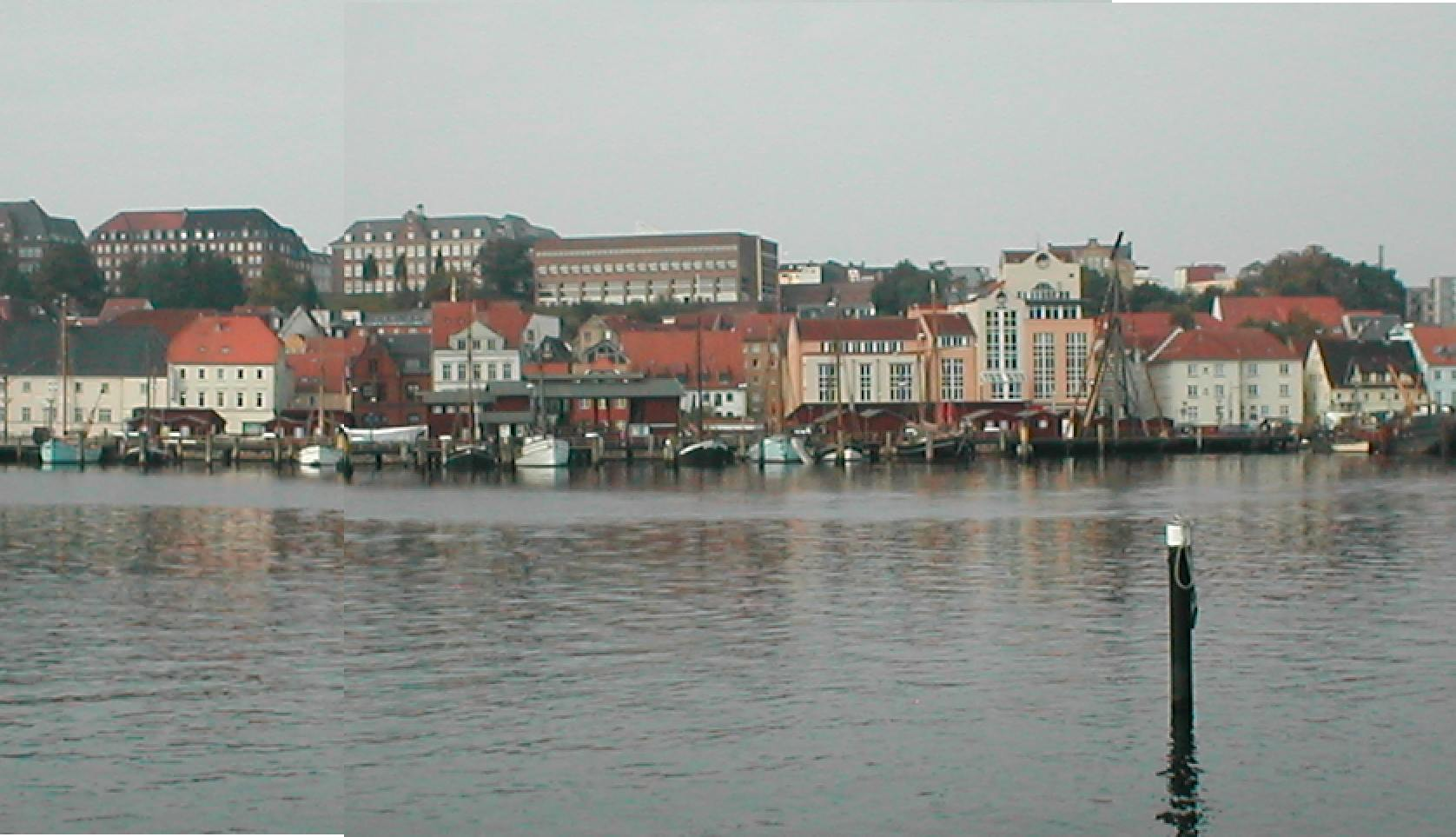 Der Museumshafen